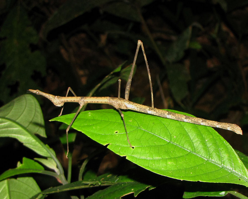 Horsehead Grasshopper (Pseudoproscopia scabra), Tambopata National Reserve, Peru